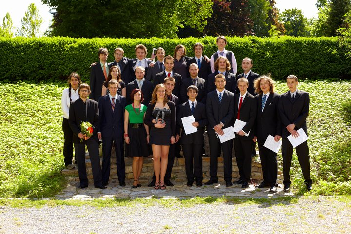 Absolventi Gymnázia INTEGRA BRNO, 2010